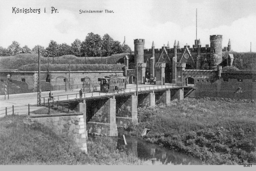 Königsberg